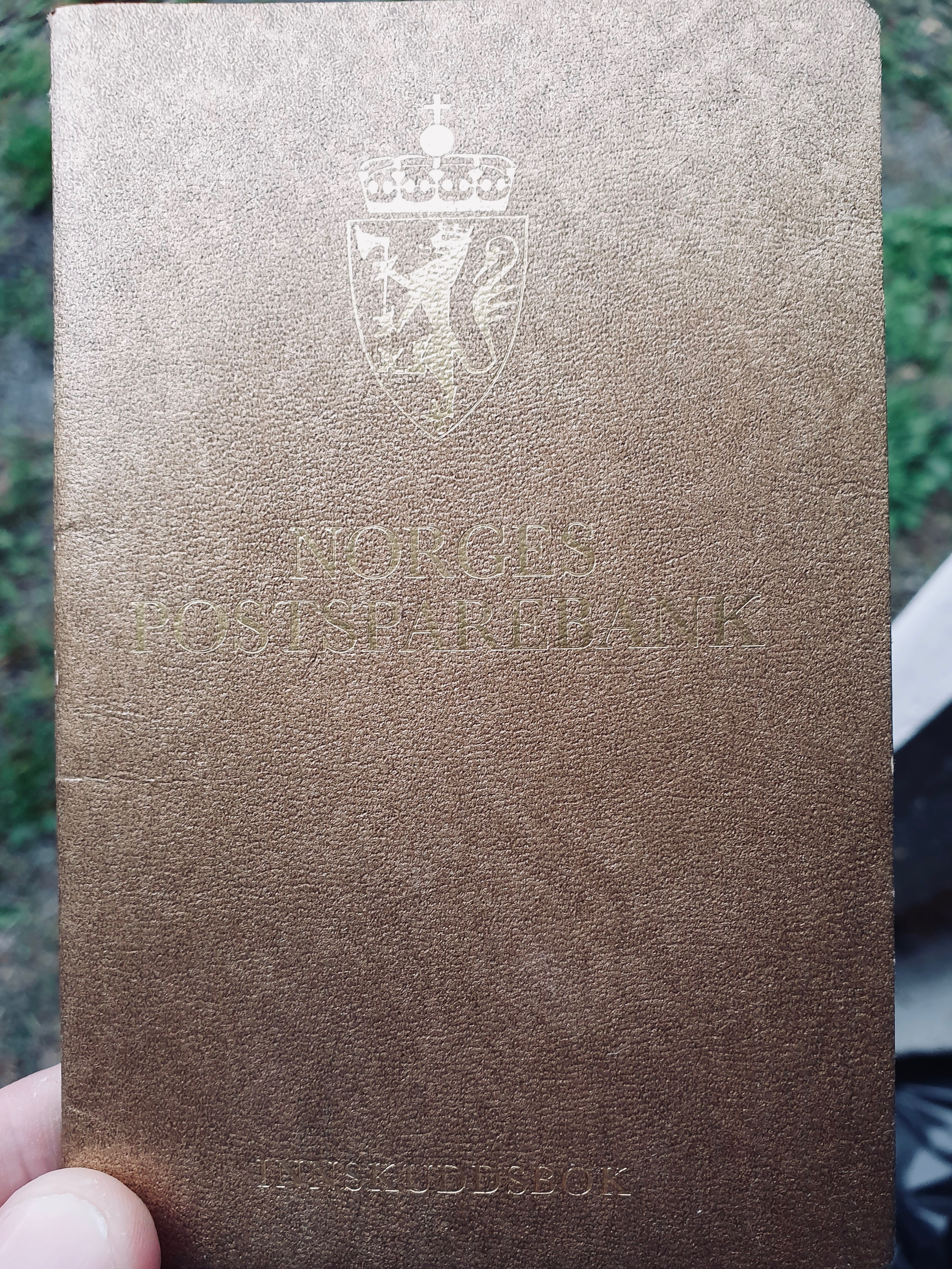 Postsparebankens Gullbok, fra 1990-tallet.